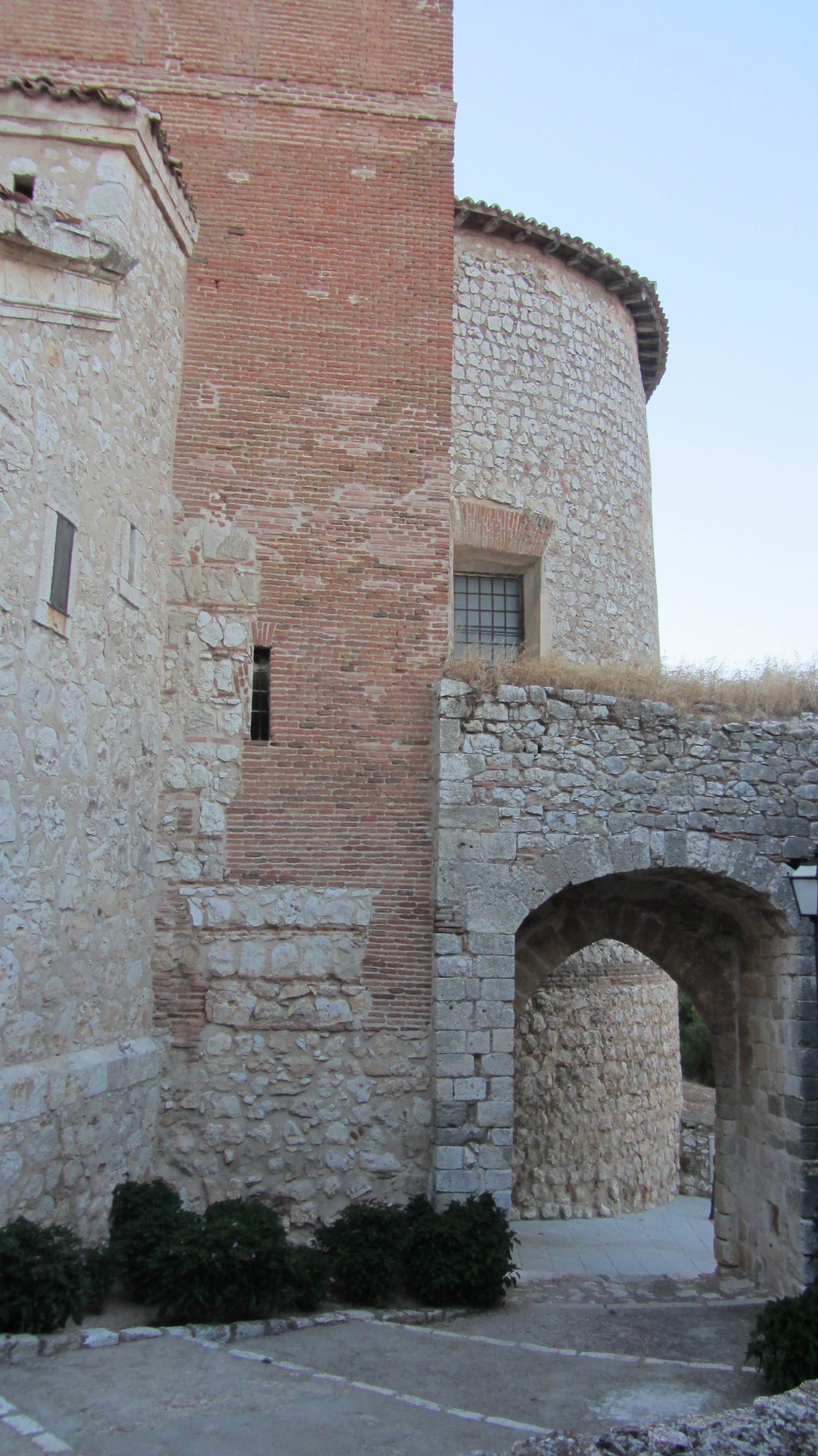 Arco de entrada al antiguo Castillo de Torremocha e Iglesia de San Torcuato en Santorcaz (Comunidad de Madrid - España).